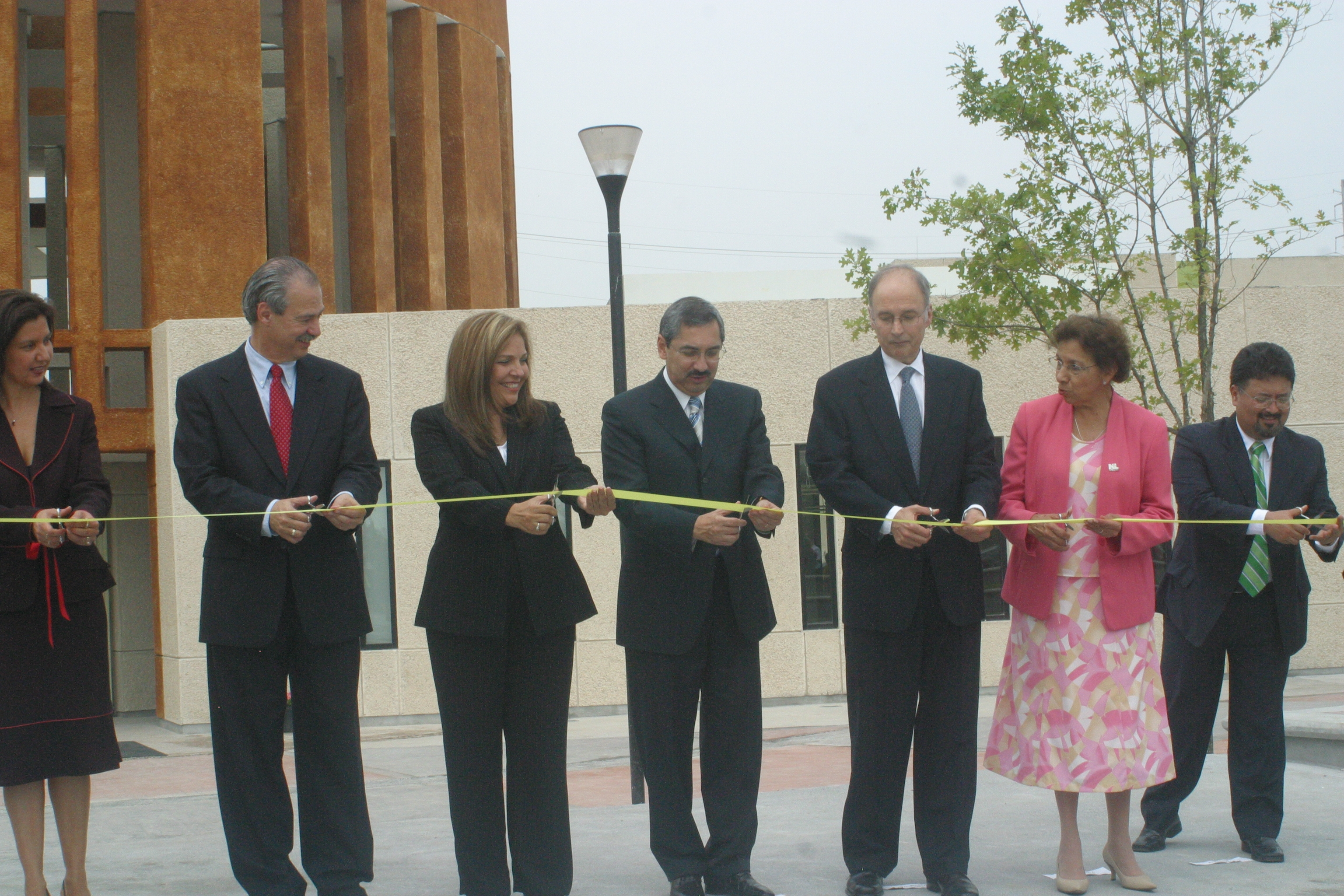 Periodismo 2